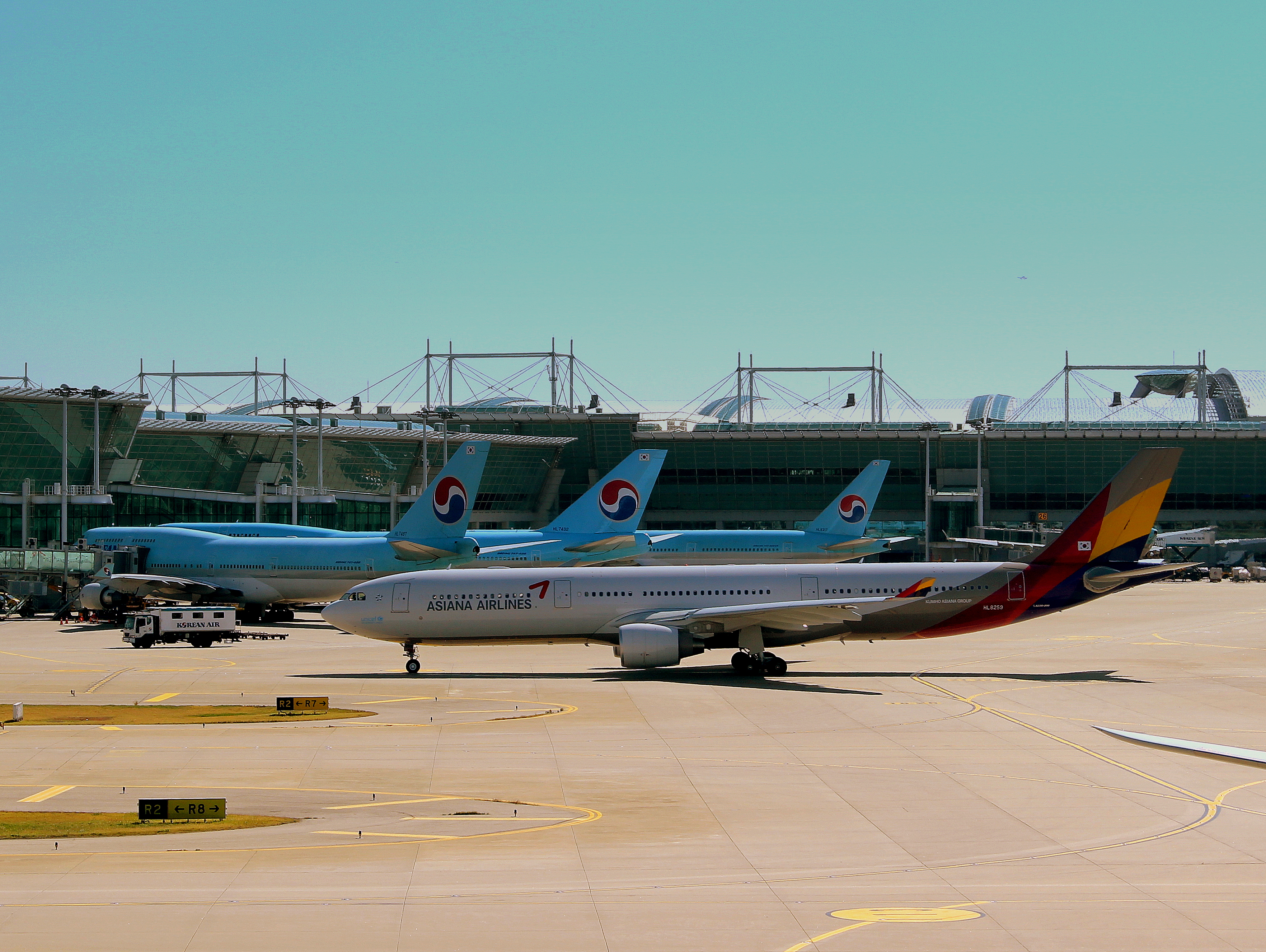 ASIANA AIRBUS A330-300 AT SEOUL INCHEON AIRPORT SOUTH KOREA OCT 2012